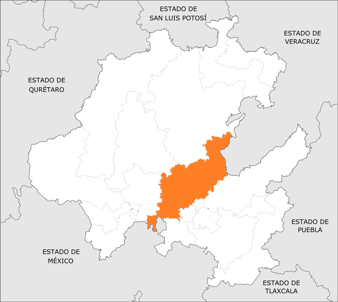 Distrito Electoral Local de Hidalgo 08